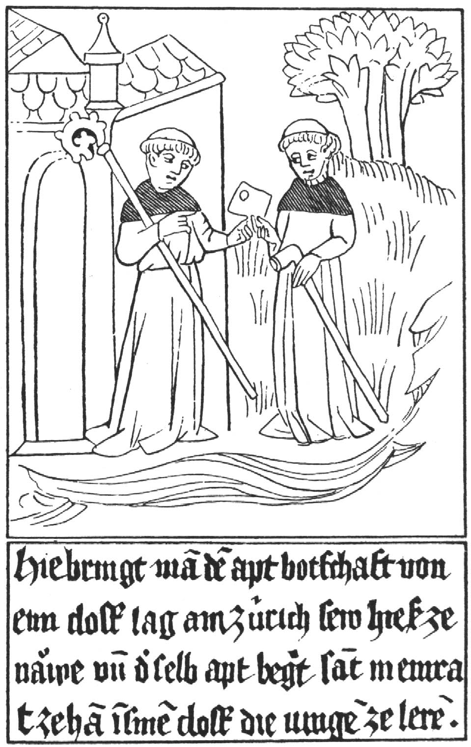 Klosterbote überbringt Brief